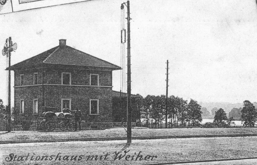 Wasserhaus des Bahnhofs Geltendorf 1900, im Hintergrund der Emminger Weiher. Mit der Trockenlegung des Weihers 1916 konnte das Wasserhaus nicht mehr genutzt werden und wurde in den 1930er Jahren abgebrochen.